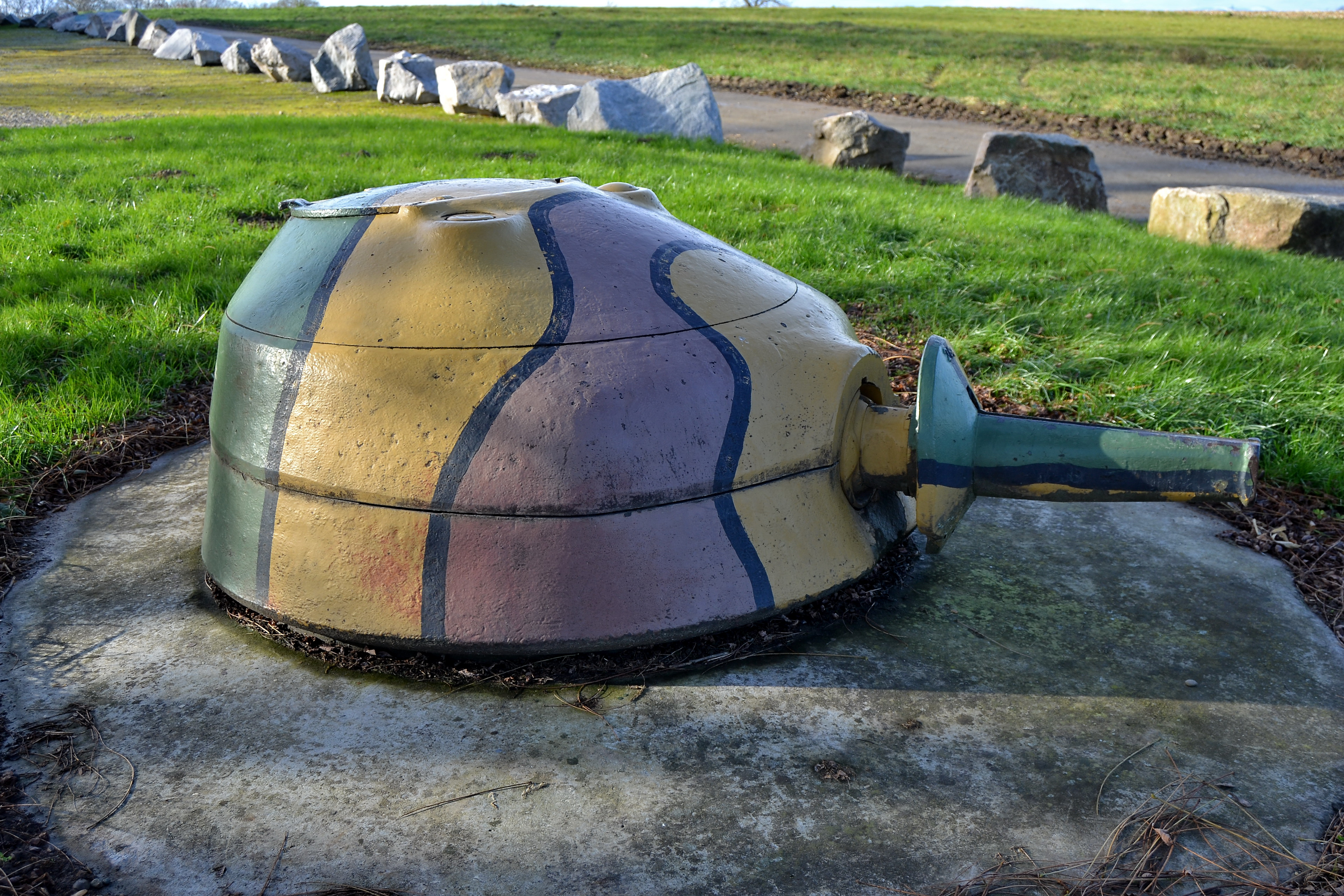 Casemate de l'Aschenbach n°86, tourelle démontable STG, Uffheim, Alsace, France